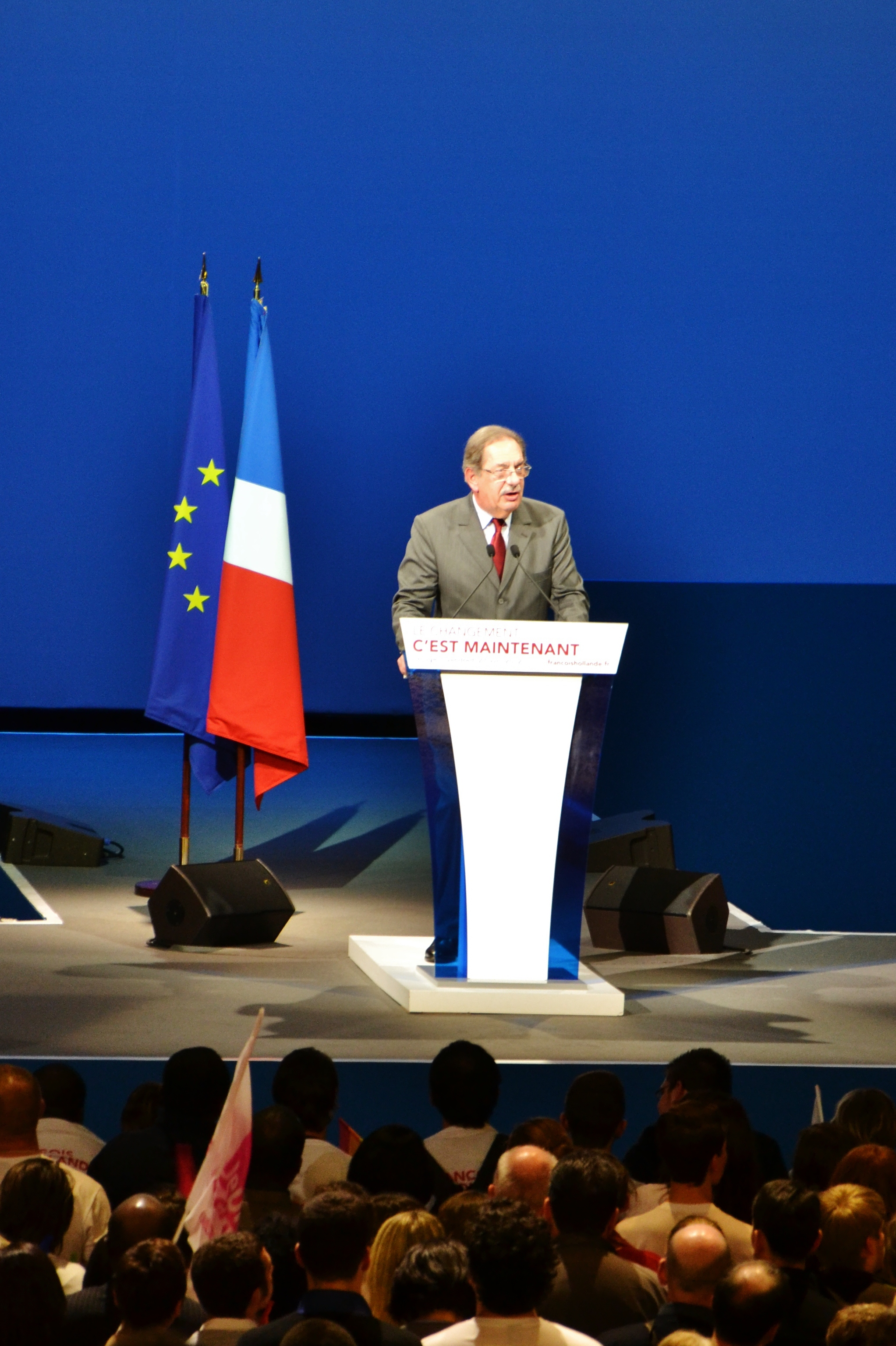 Alain Rodet, député-maire PS de Limoges, s’exprimant lors du meeting de François Hollande au Zénith de Limoges, le 27 avril 2012